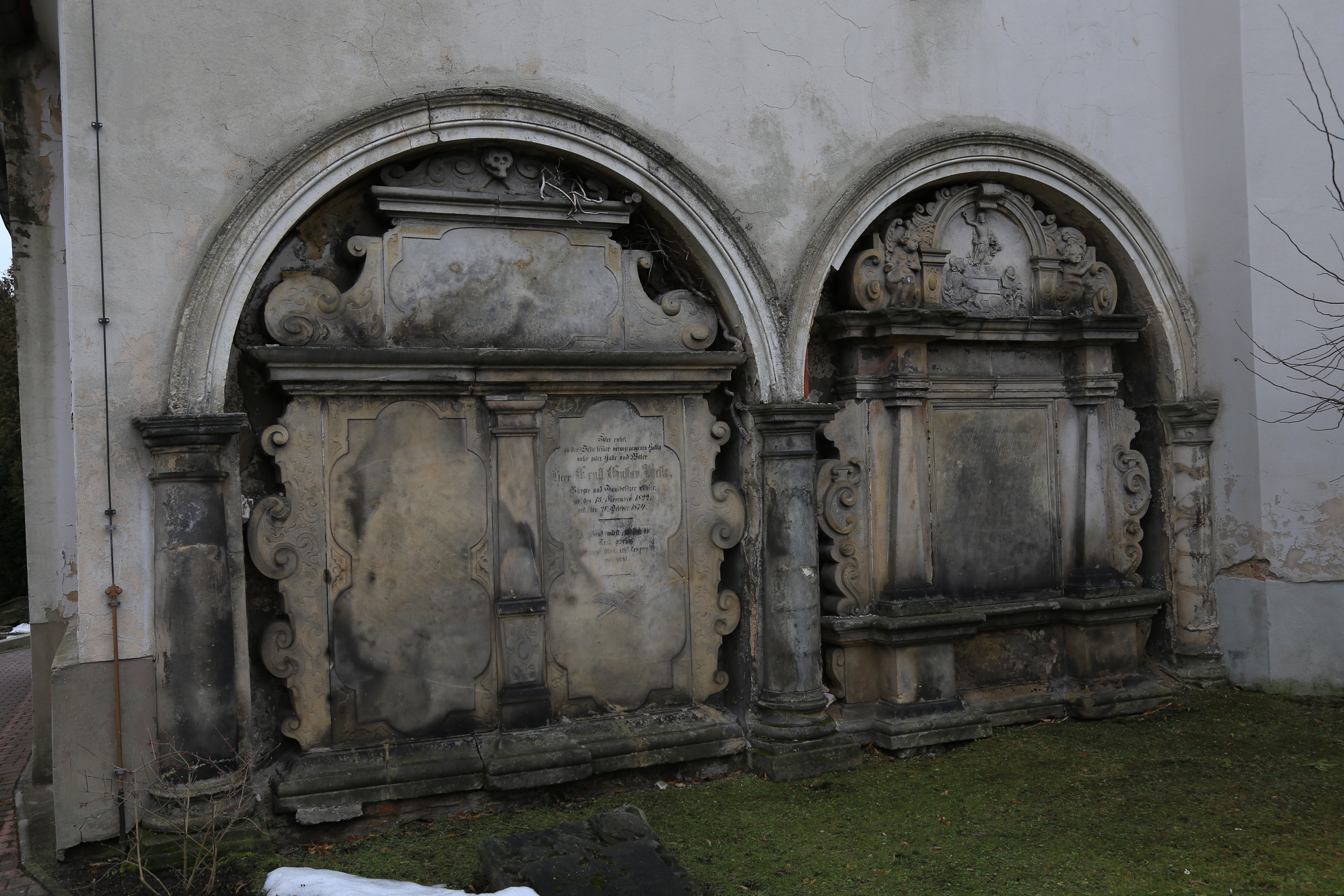 Zittau Frauenkirche (5)